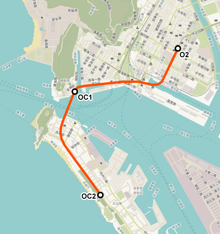 2000年左右的高雄捷運旗津延伸線版本